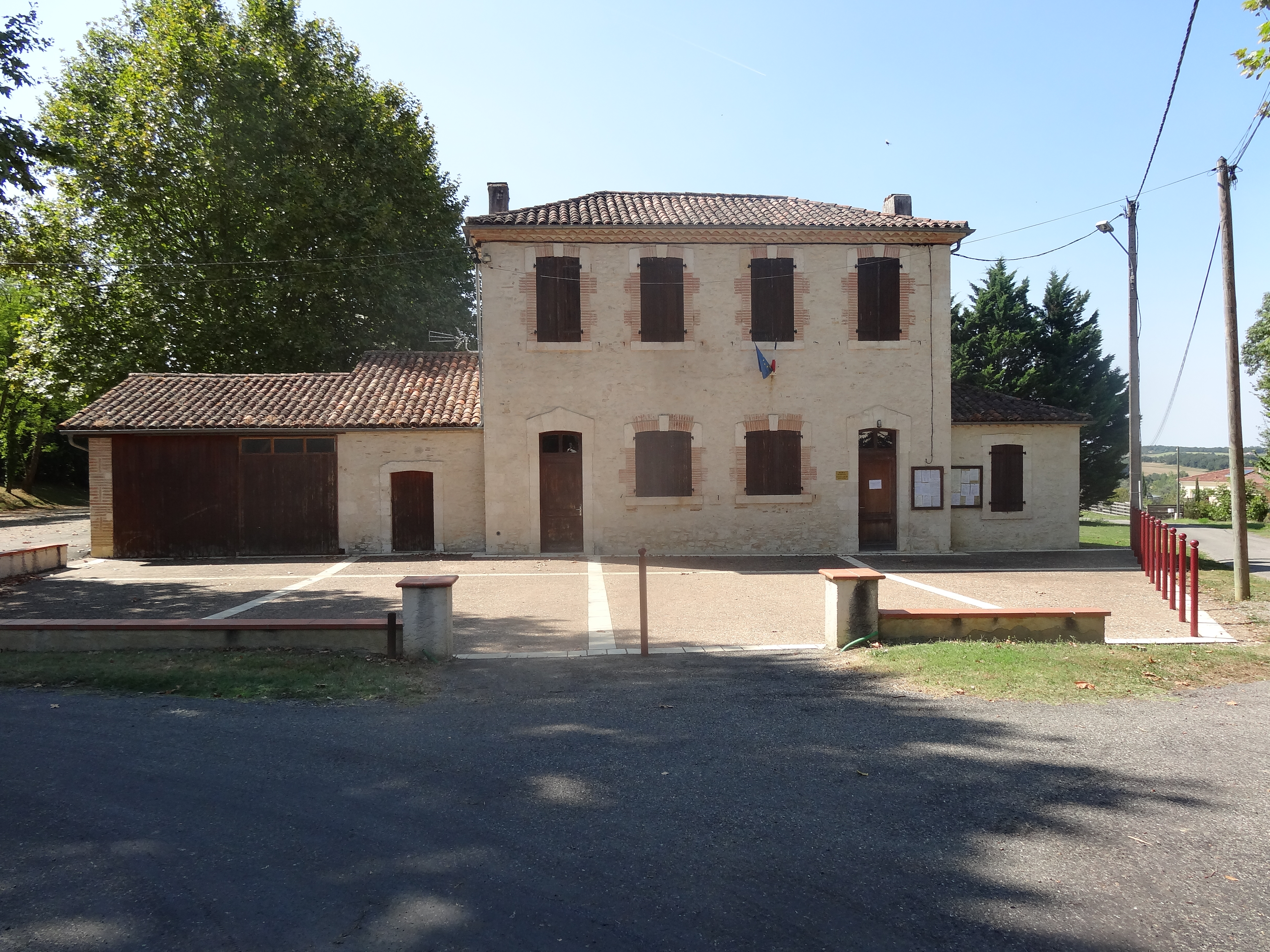 Mairie de Mansempuy.